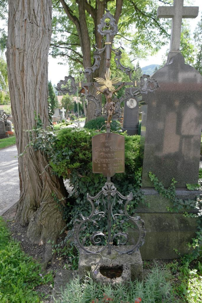 Grab des Dramatikers Franz Kranewitter (1860-1938) auf dem Westfriedhof Innsbruck